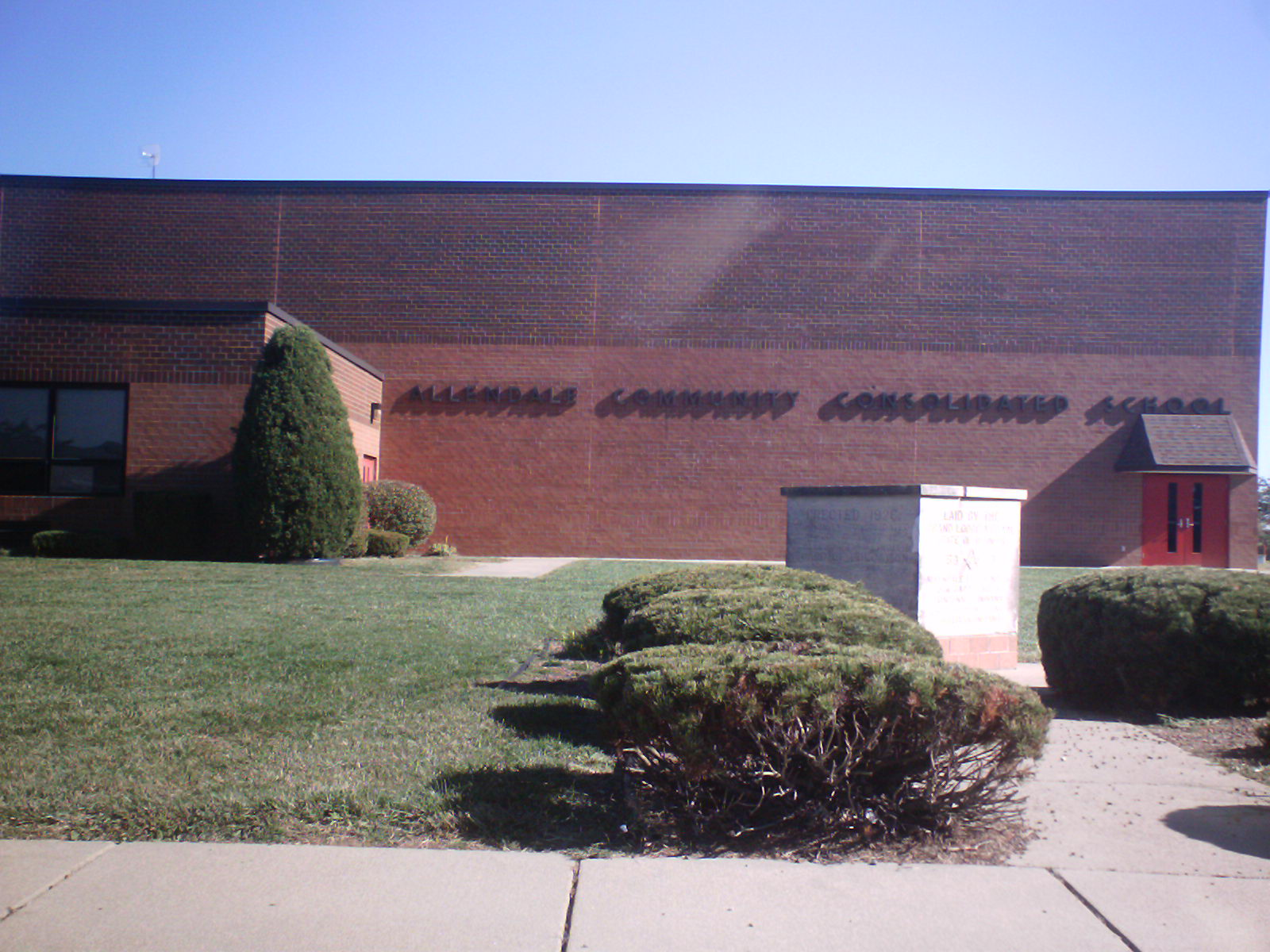 Allendale, Illinois School